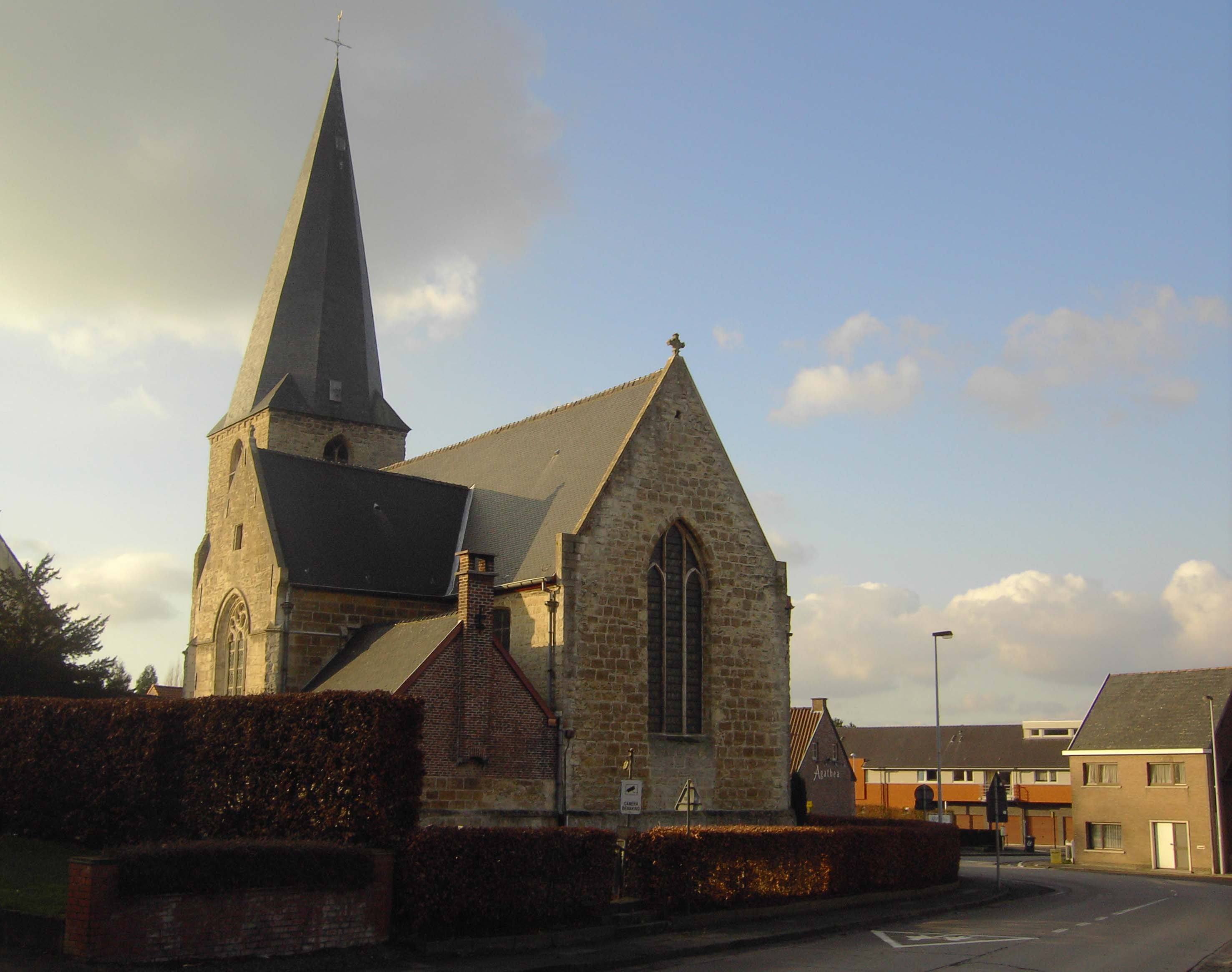 Sint-Agatha-kerk in Landskouter - Oosterzele - Oost-Vlaanderen - Vlaanderen - België